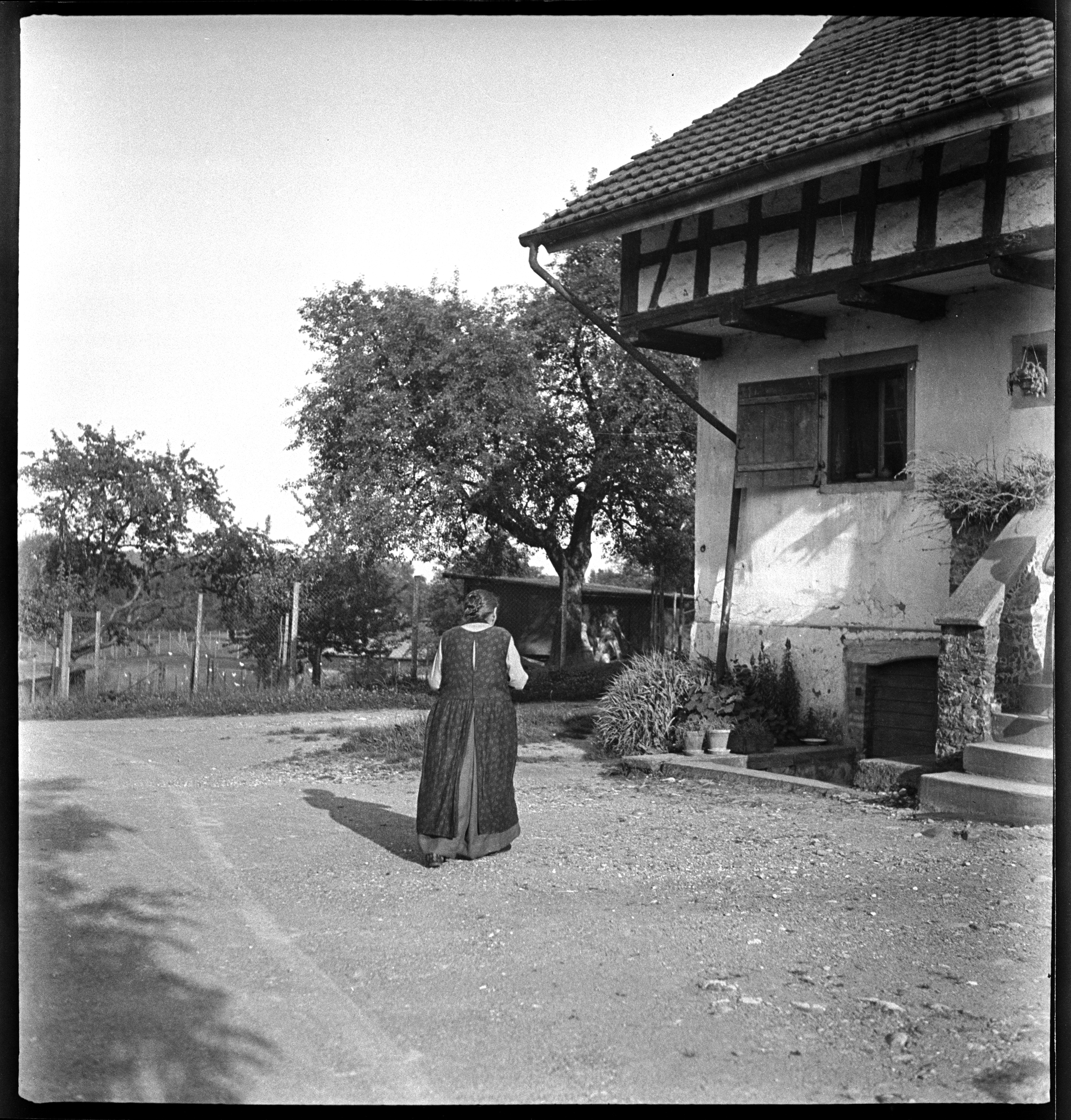 Schweiz, Horgen: Gutshof Bocken; Frau vor Bauernhaus; Horgen